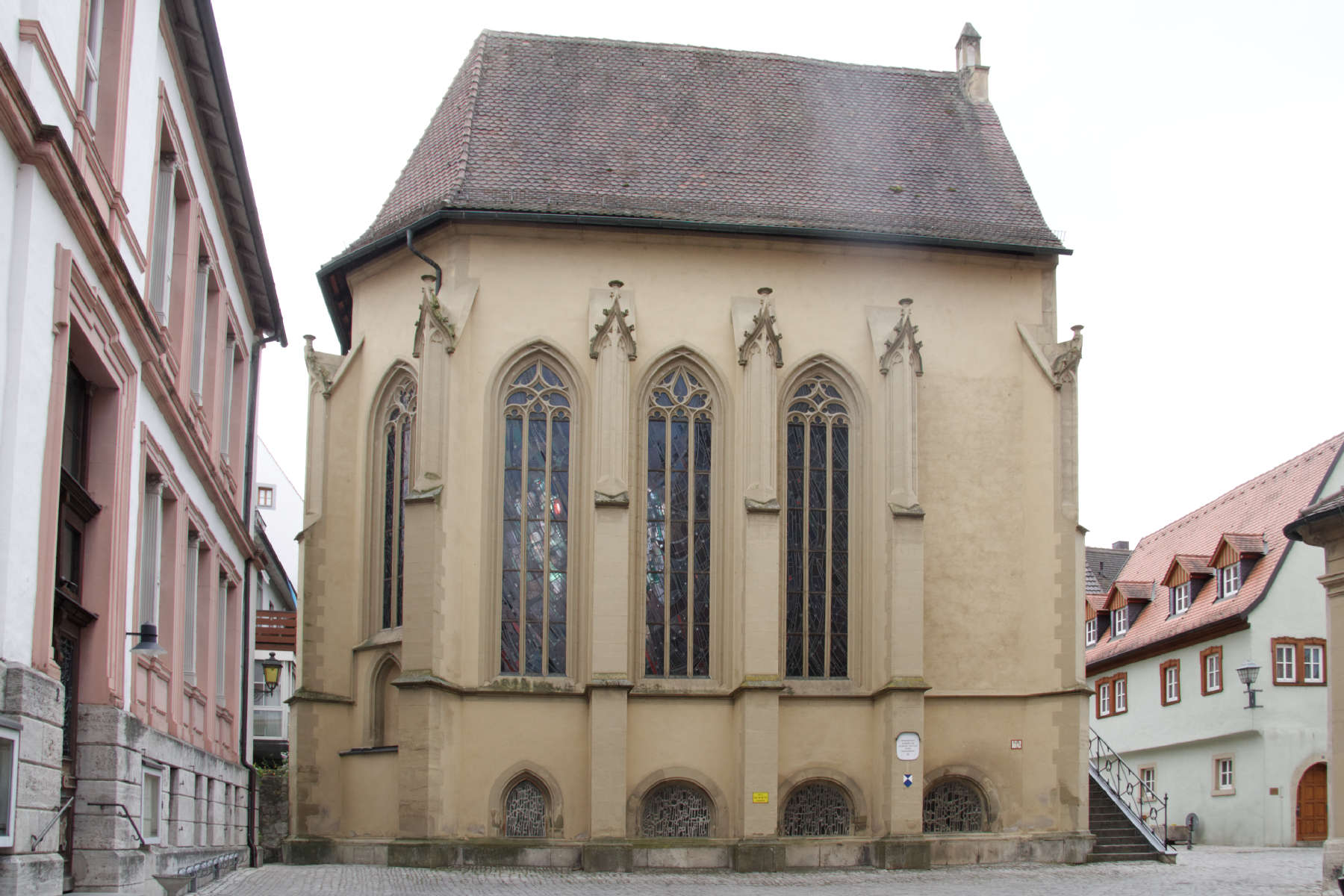 Ochsenfurt, Michaelskapelle am Kirchplatz von Norden